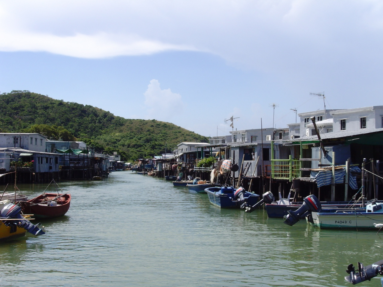 Fischerdorf Tai O